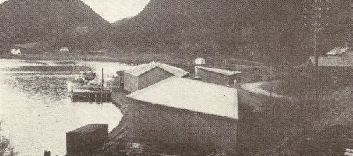 Langstein kai og Langsteinpasset i daværende Skatval kommune.